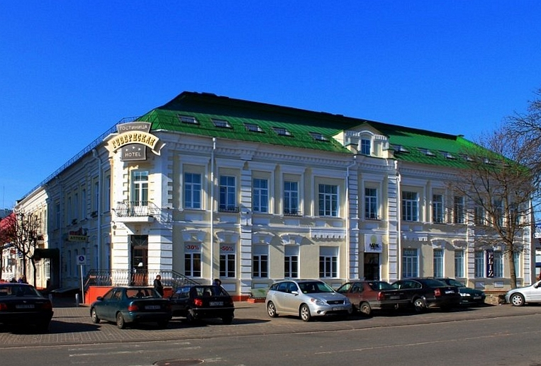 Жаночая гімназія (Ленінская 56)